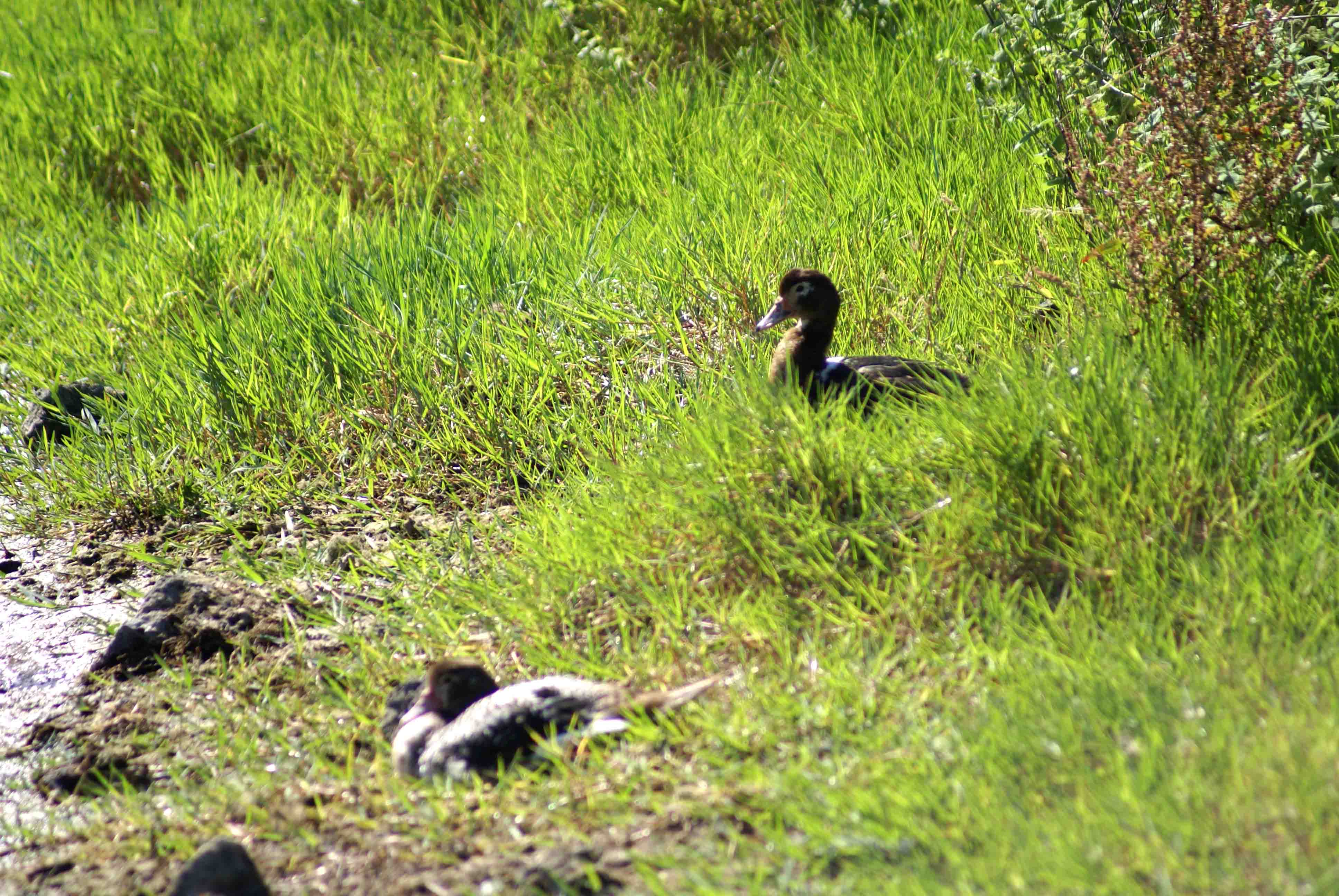 habitantes do Paul da Praia da Vitória, Praia da Vitória, ilha Terceira, Açores, Portugal.